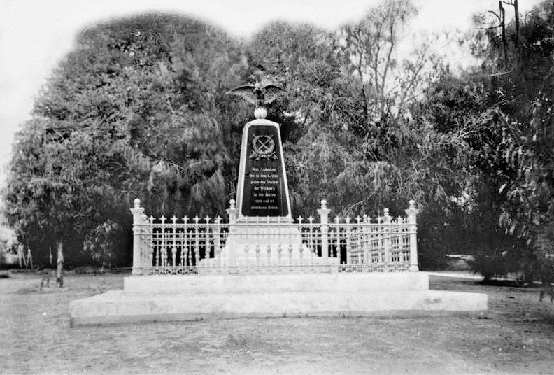 Windhuk, Kriegerdenkmal in Gouvernementsgarten